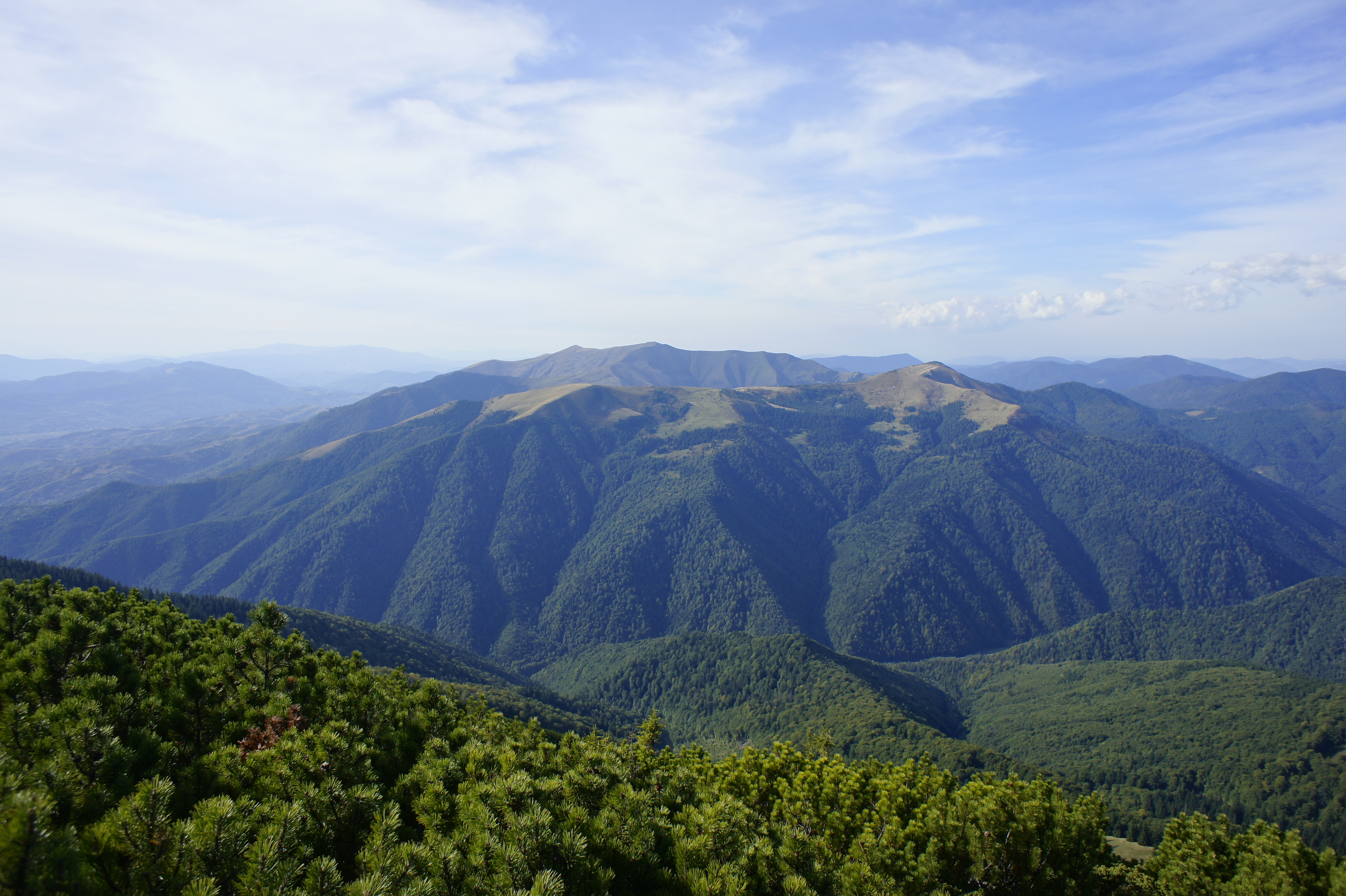 Дарвайка, Ясновець, Негровець — Внутрішні Ґорґани, Карпати, Україна